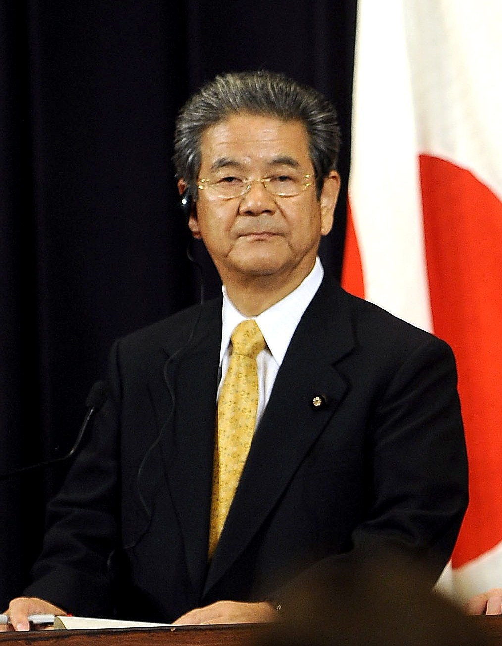 Japanese Defense Minister Toshimi Kitazawa